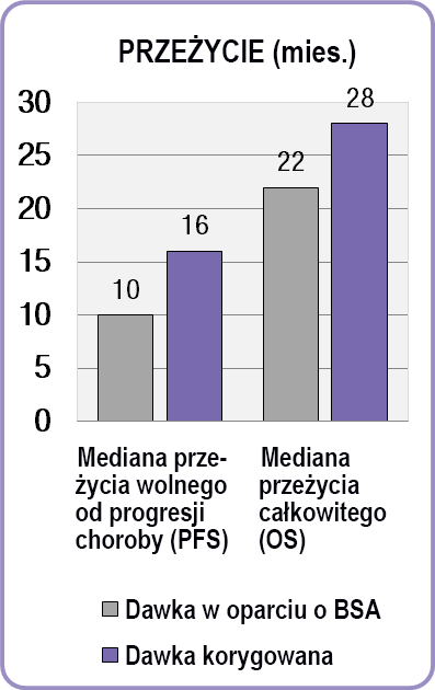 Porównanie odpowiedzi na leczenie 5-fluorouracylem, w zależności od sposobu dobierania dawki. BSA – dawka leku jest obliczana w stosunku do pola powierzchni ciała. korygowana – na podstawie cotygodniowego pomiaru stężenia leku w surowicy[1].